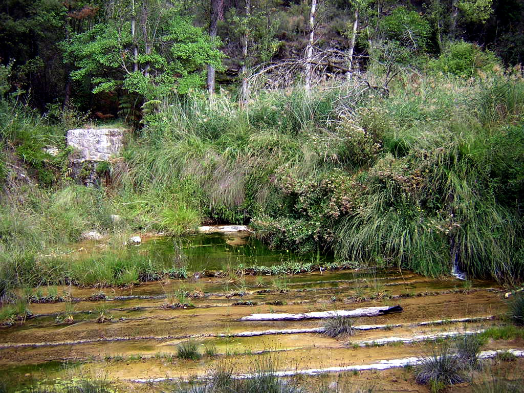 La Resclosa de Saladic (Monistrol de Calders, Moianès)